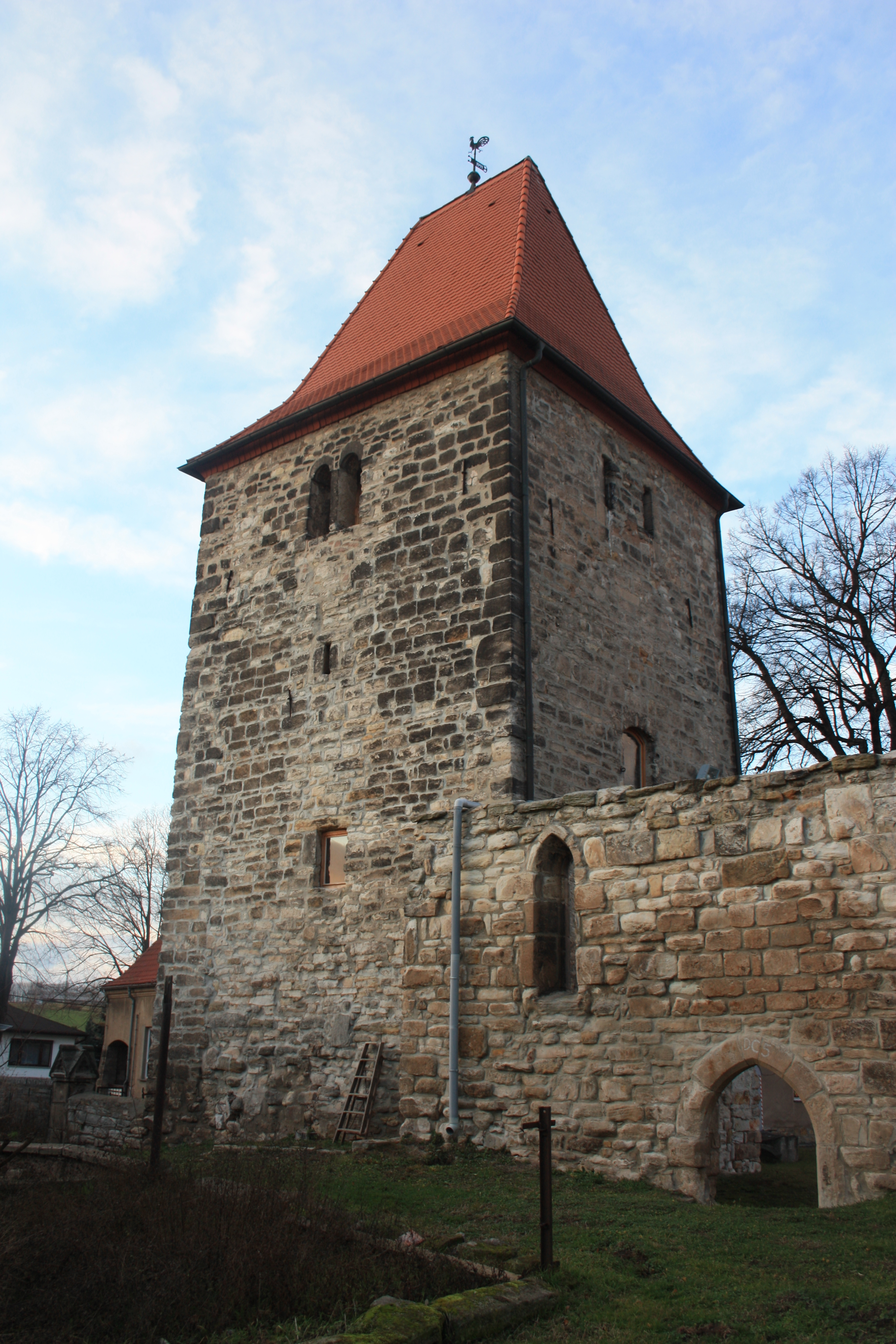 der Kirchturm von Polleben ohne Schnee